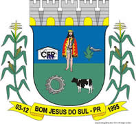 Brasão